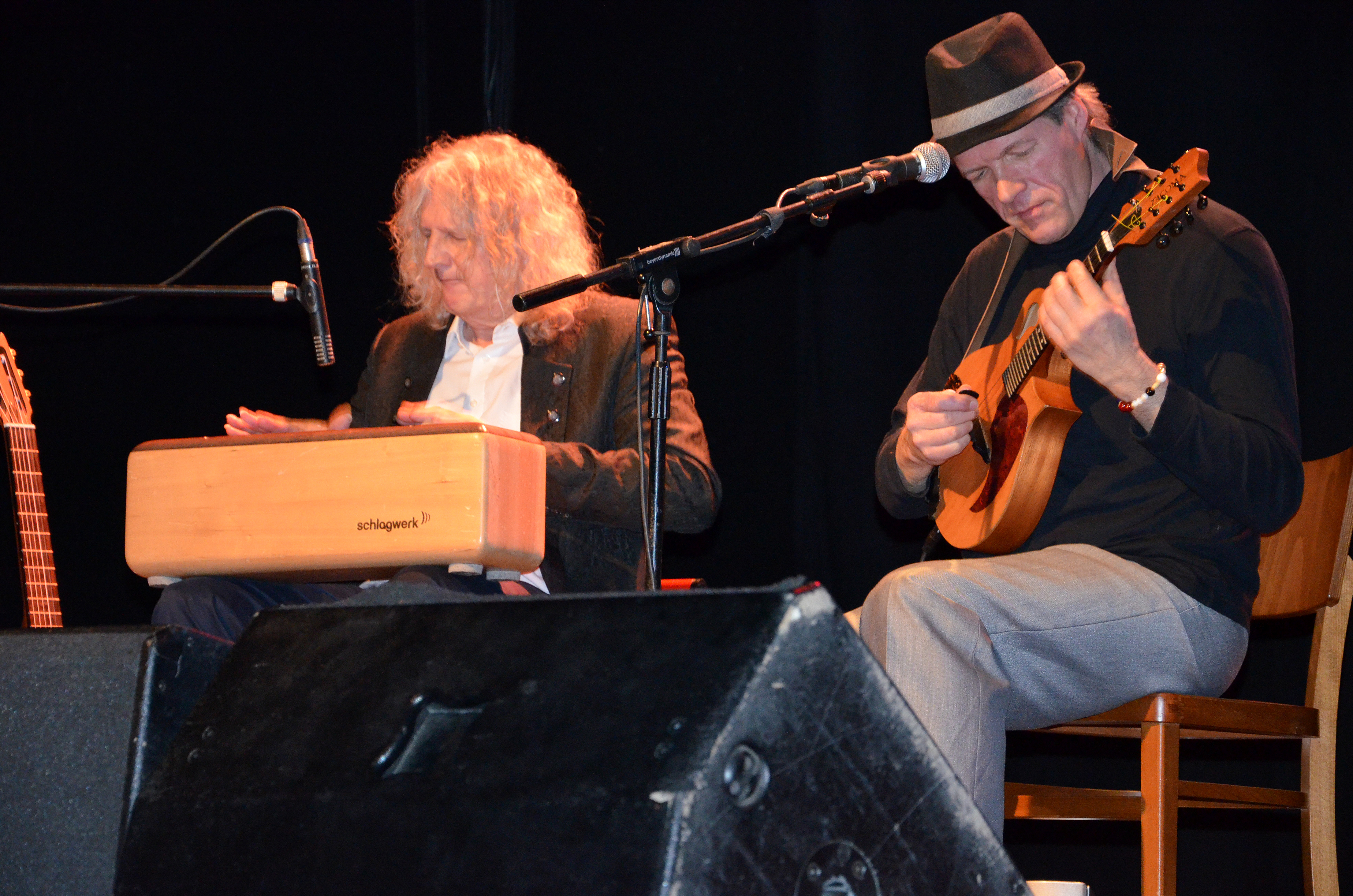 Zum Frühlingsempfang 2014 im Raschplatz Kulturzentrum in Hannover boten die Musiker Wolfgang Stute und Hajo Hoffmann gemeinsames Spiel auf der neuen Bühne ...